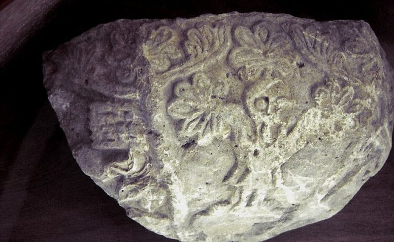 Kirke Stillinge Kirke i Danmark. Dåbskapellet, fragment af en fabeldyrsfont